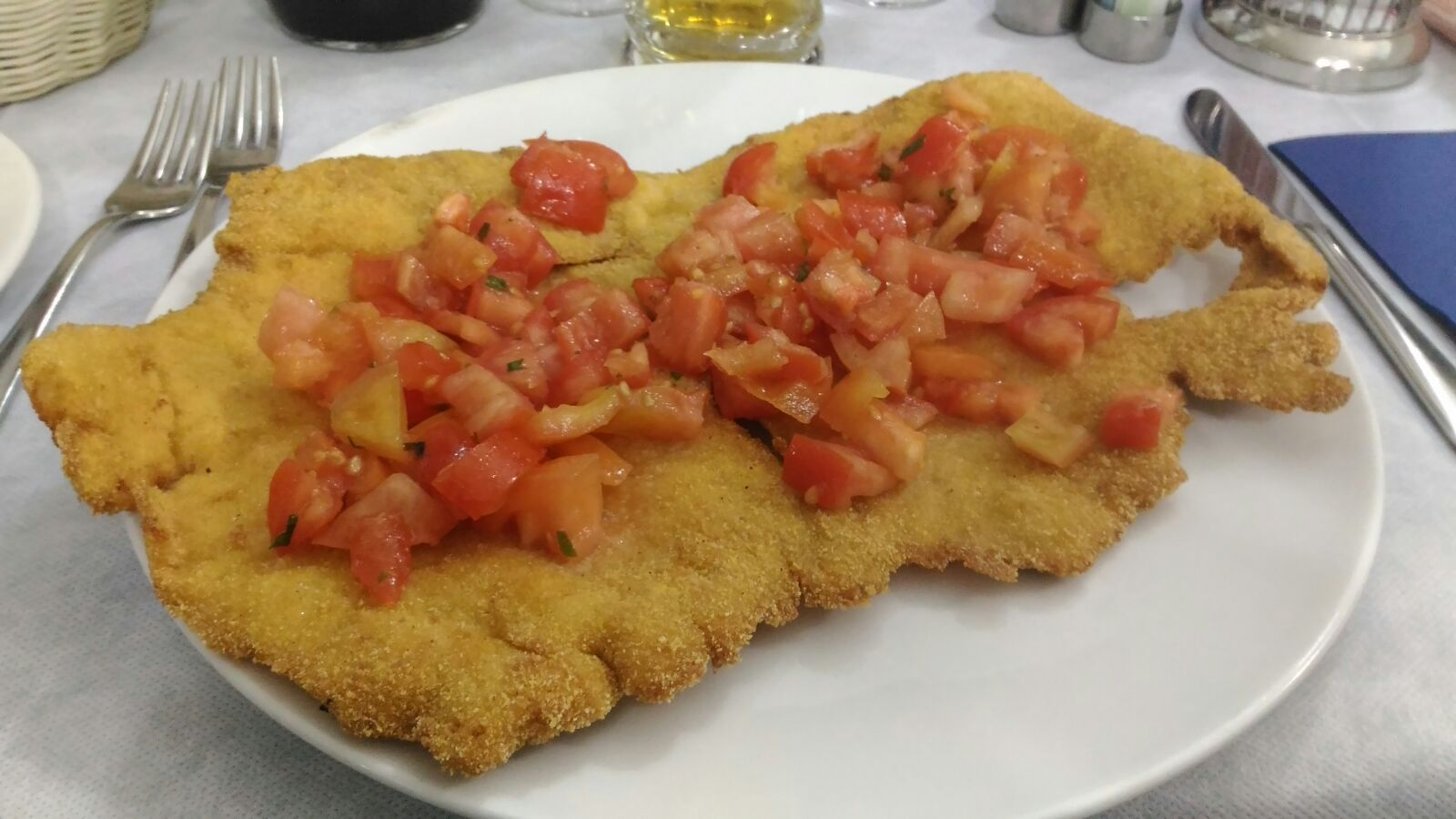 Cotoletta alla milanese decorata con pomodorini